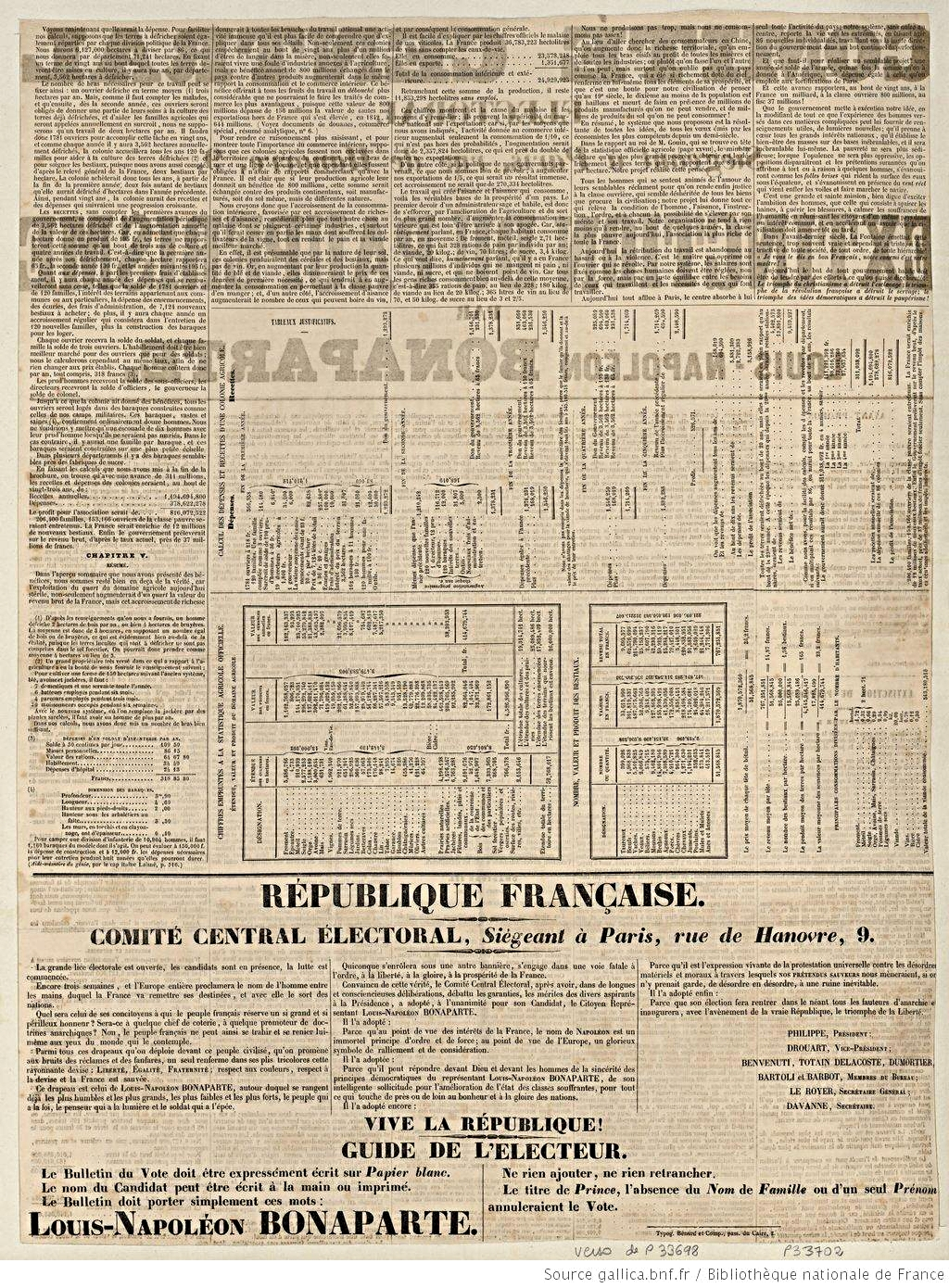 Louis-Napoléon Bonaparte, Comité central Électoral Siégeant à Paris, rue de Hanovre, 9. Extinction du paupérisme. Reproduction de 5 chapitres de la brochure du prince, impr. recto-verso sur 5 colonnes, avec des tableaux statistiques imprimés verticalement. Le bas du verso est occupé par le texte du n° 15.246 et par le "Guide de l'électeur" in Recueil, Collection de Vinck. Un siècle d'histoire de France par l'estampe, 1770-1870. Vol. 123, (pièces 15217-15323), République de 1848, Réf. bibl. : De Vinck, 15248.